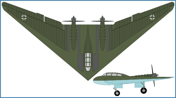 Horten H7 1944